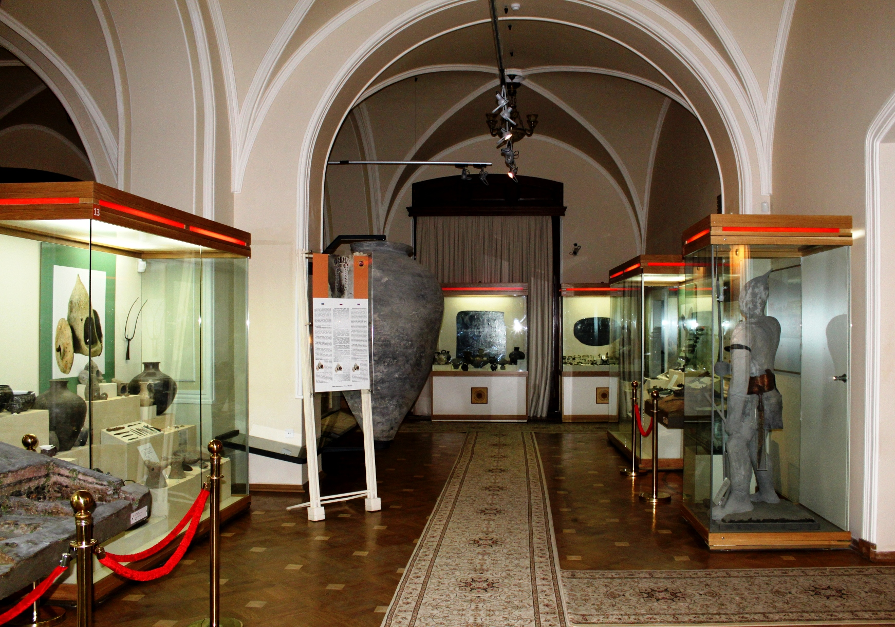 Музей истории Азербайджана один из залов.